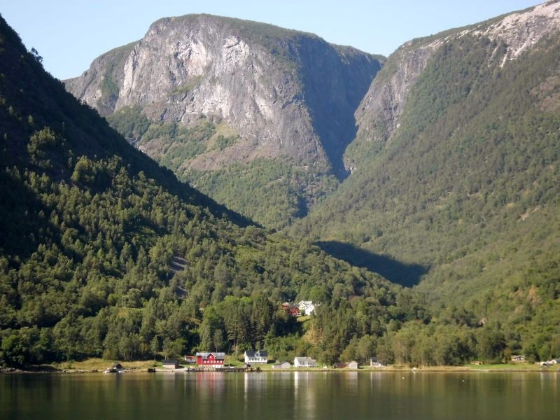 Siedlung Dyrdal am Nærøyfjord, Sogn og Fjordane, Norwegen